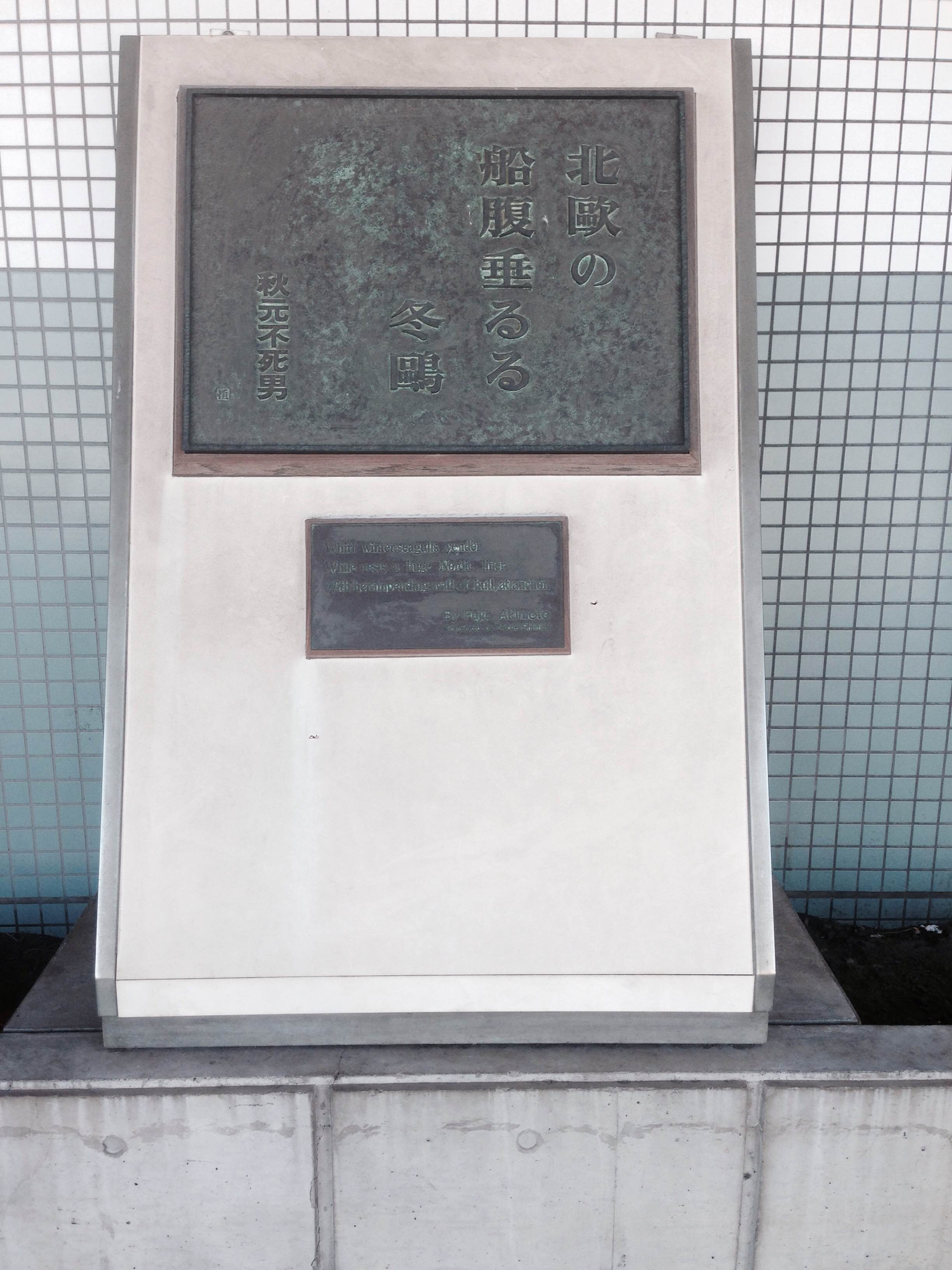 横浜市大桟橋に所在